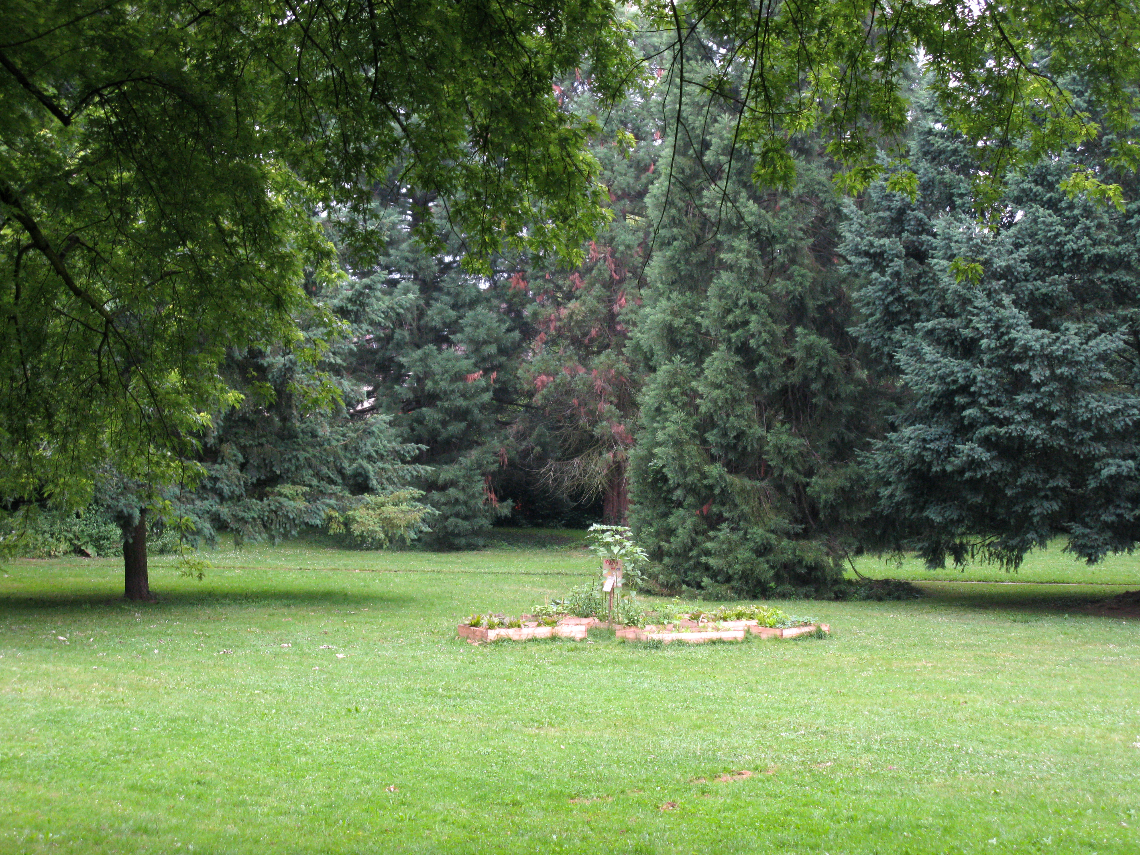 Urban Geradening in der Joseph-Brandel-Anlage